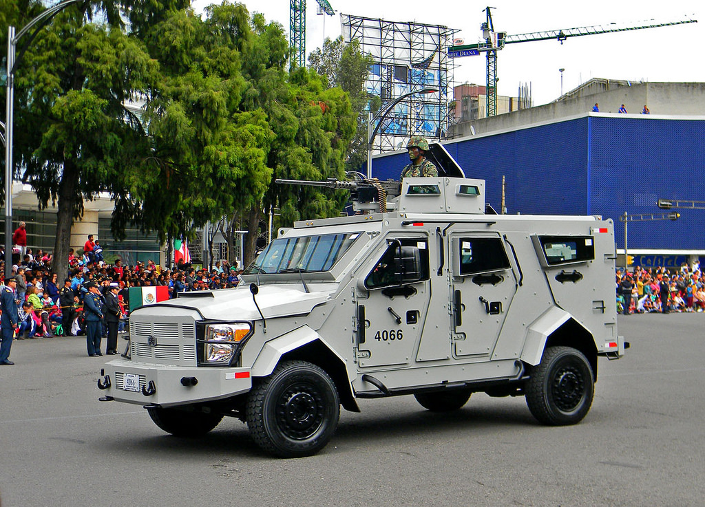 vehiculo tactico de asalto DN - XI de fabricacion mexicana